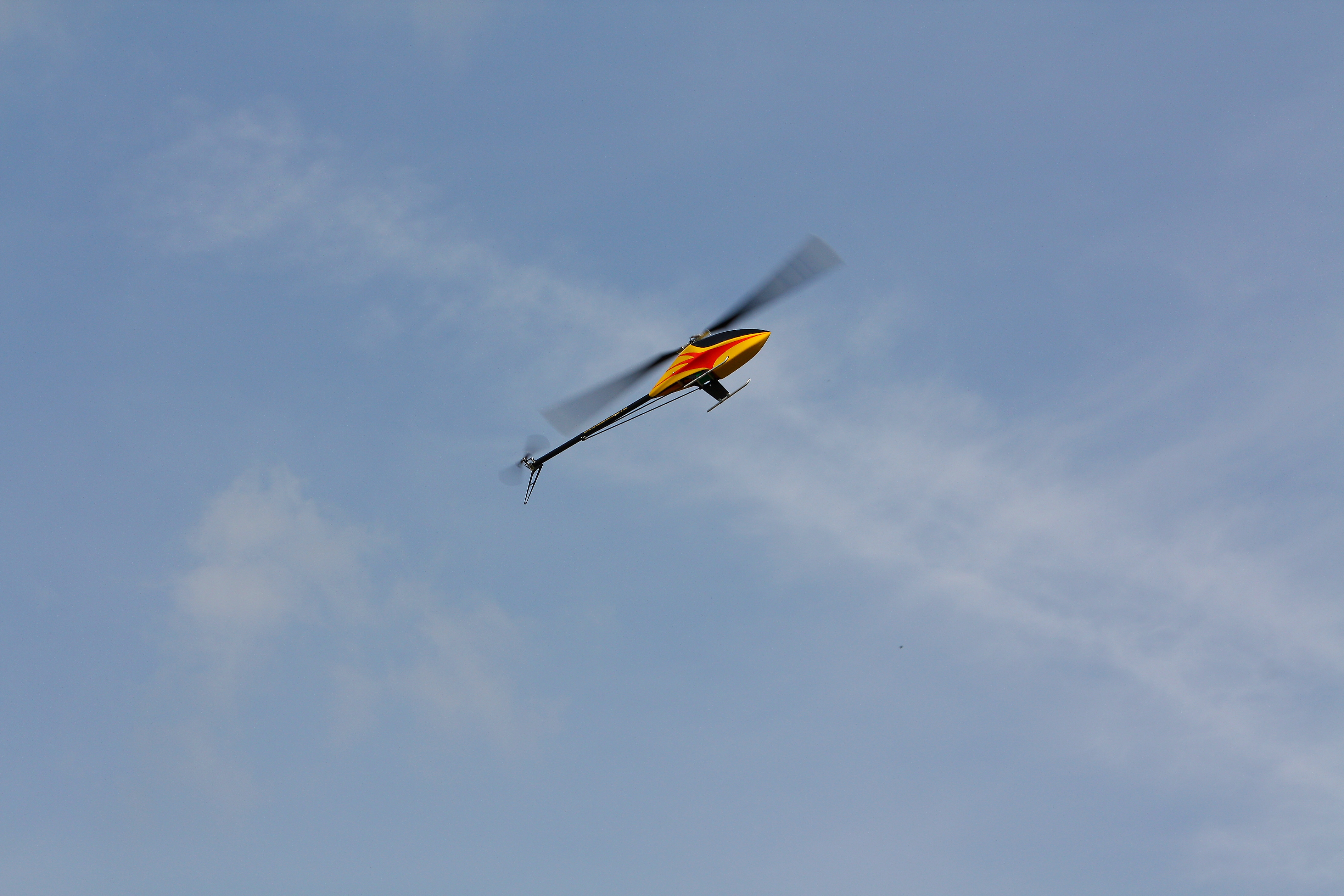 Steigflug zur Einleitung eines Turns mit einem TDR-Henseleit RC-Helikopter